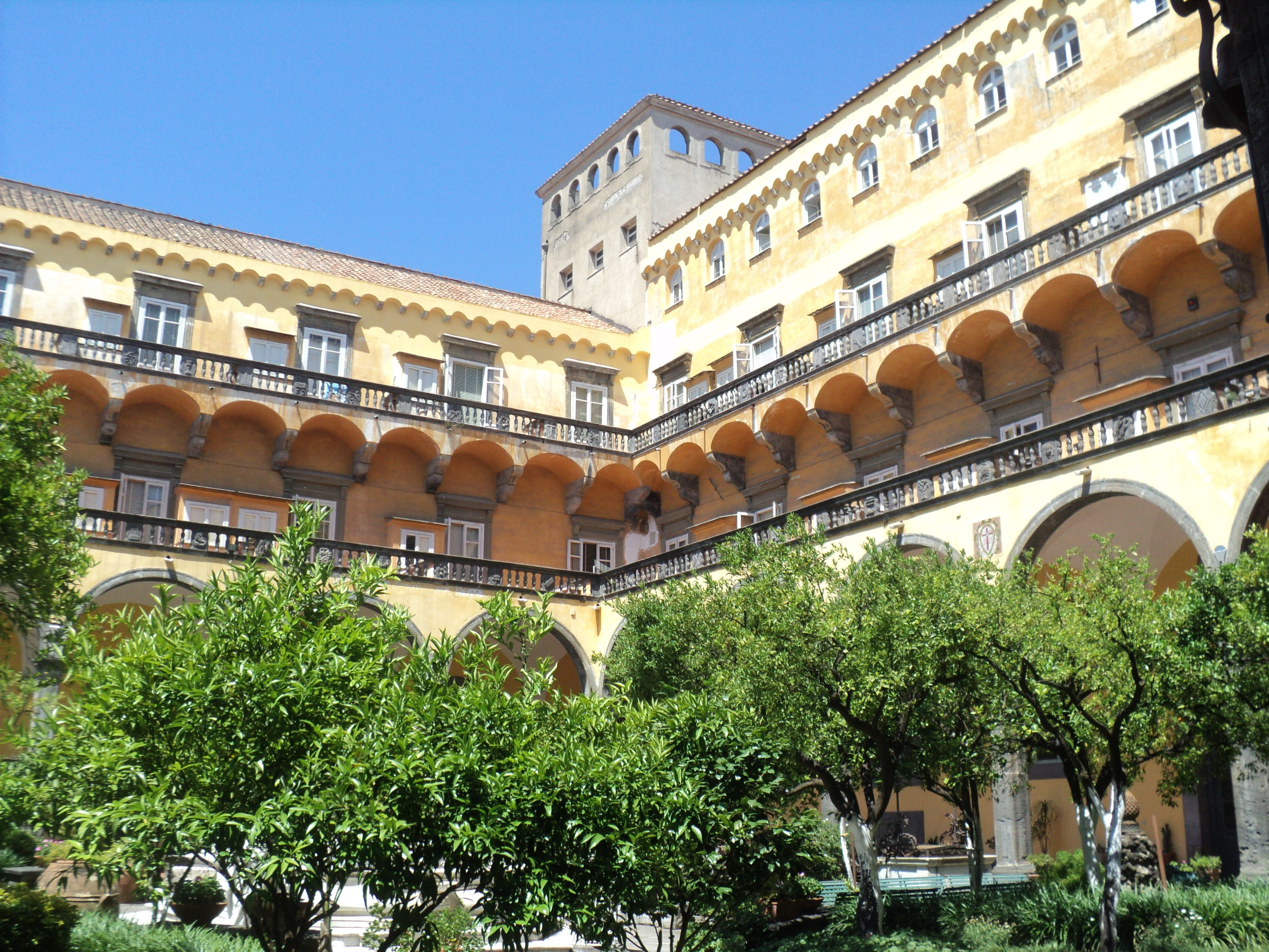 Chiostro di San Gregorio Armeno (Napoli)